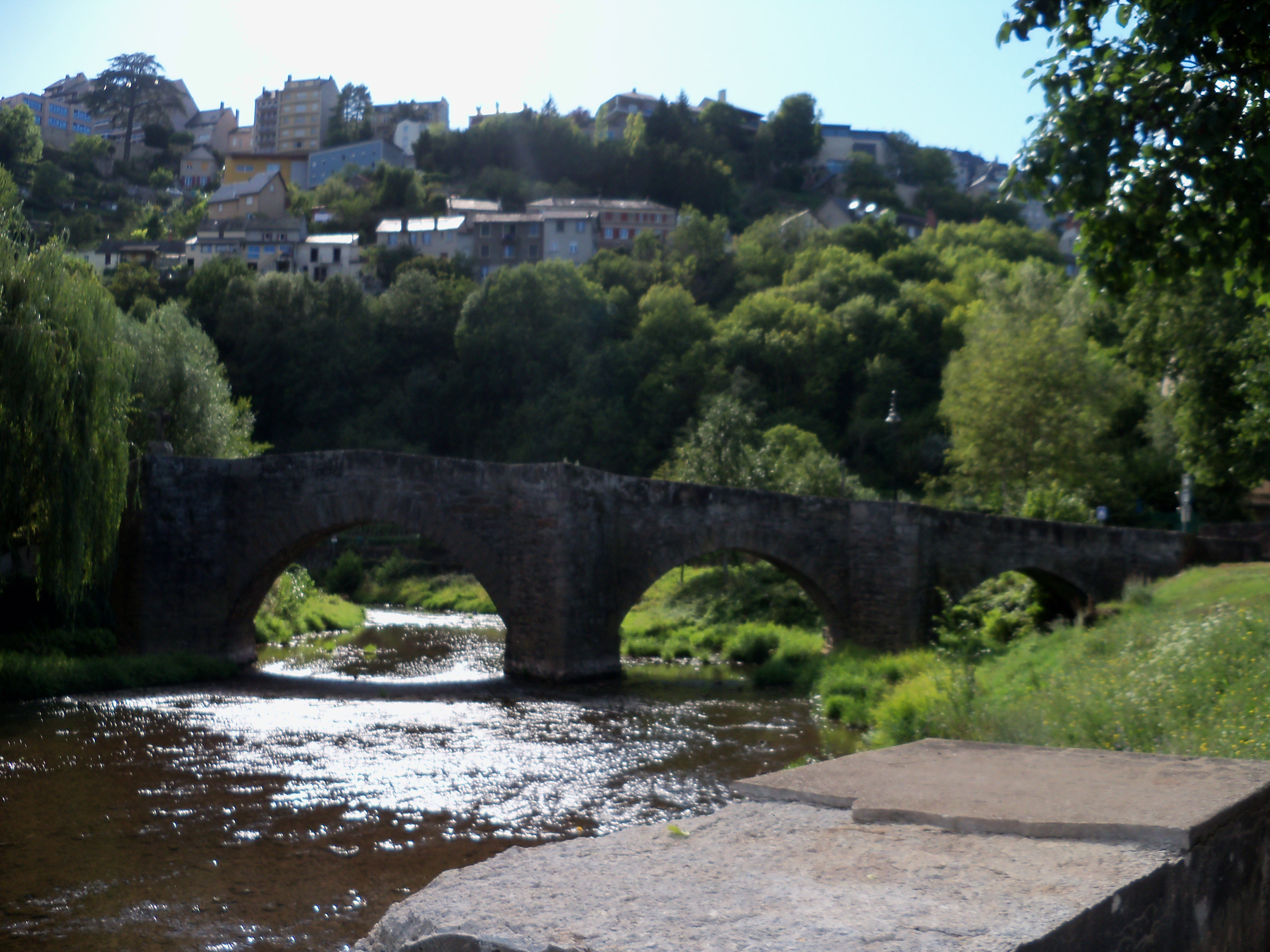 Au bord de l’Aveyron, dans le parc de "Layoule"